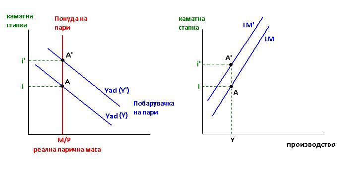 LM кривата се поместува кон лево од LM на LM' кога побарувачката на пари се зголемува, бидејќи како што е прикажано на графиконот од лево, по кое било фиксно дадено ниво на вкупно производство, рамнотежната каматна стапка се зголемува од A на A' .